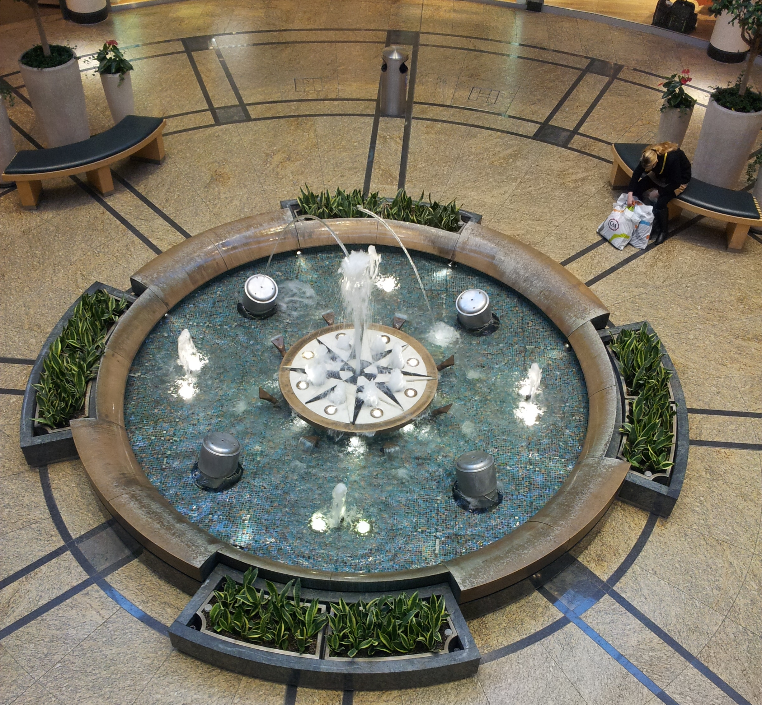 Brunnen im Allee-Center Magdeburg